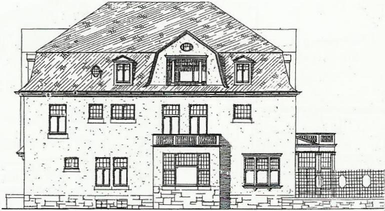 Villa Clemen in Bonn: Aufriss der Südseite nach Julius Rolffs 1908